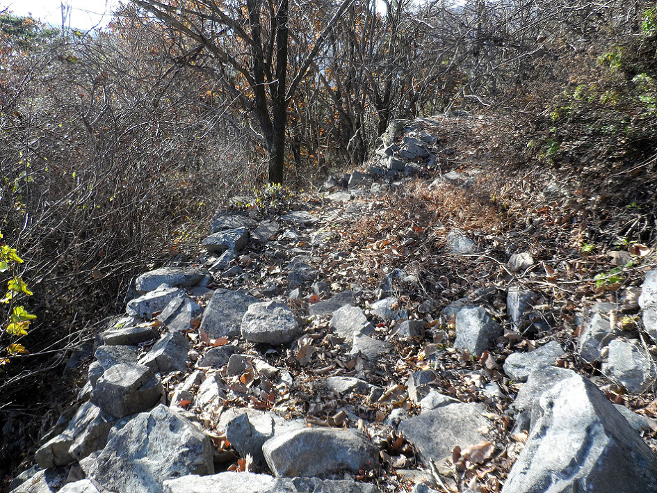 신라 문무왕 3년(663)에 쌓은 신라 산성의 남문터이다.